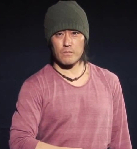 「COMPLETE SELECTION MODIFICATION KABUTOZECTER」商品紹介 (高岩成二)